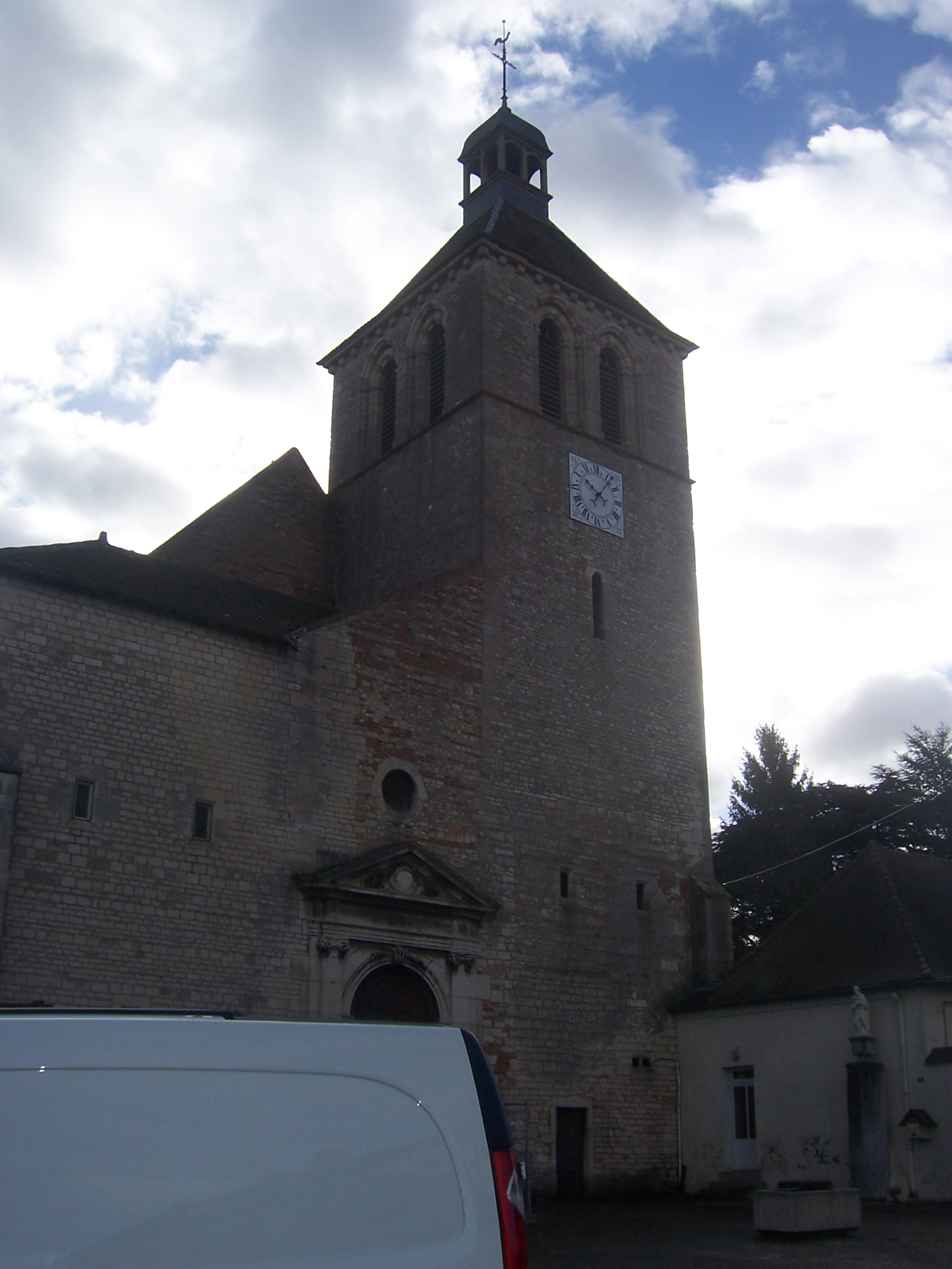 Saint-Marcel Eglise